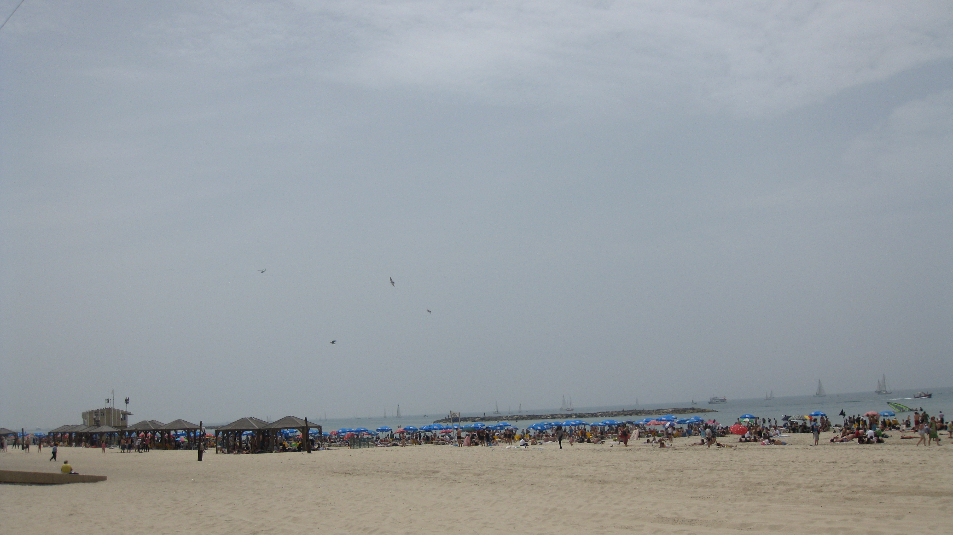 Israel 62nd Independence Day- Tel Aviv Beaches יום העצמאות השישים ושתים למדינת ישראל חופי תל אביב